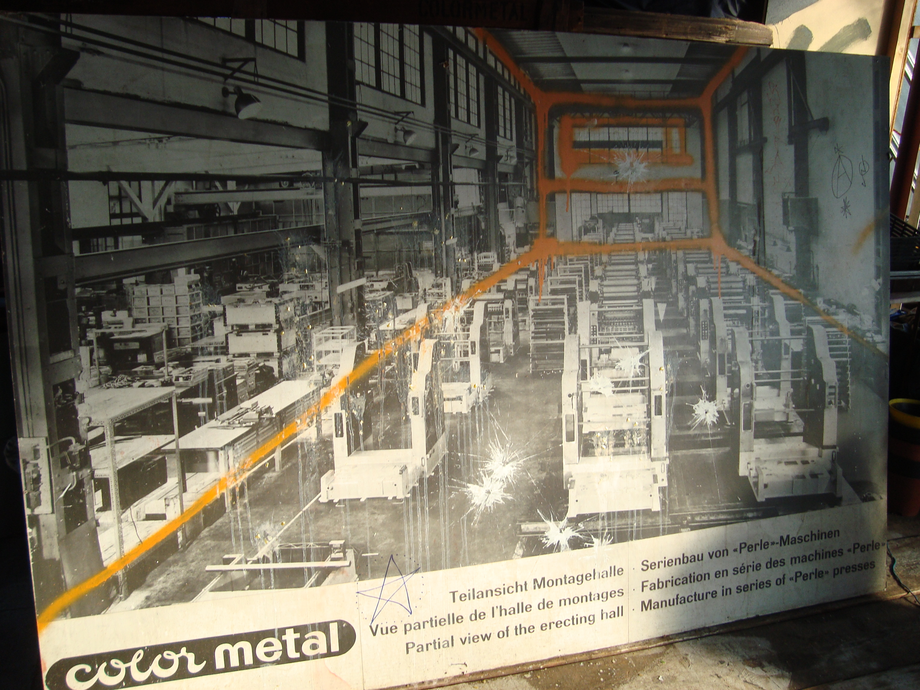 Schautafel in der besetzten Binz zeugt von der Geschichte der "Color Metal AG", die die Fabrikshallen benutzte